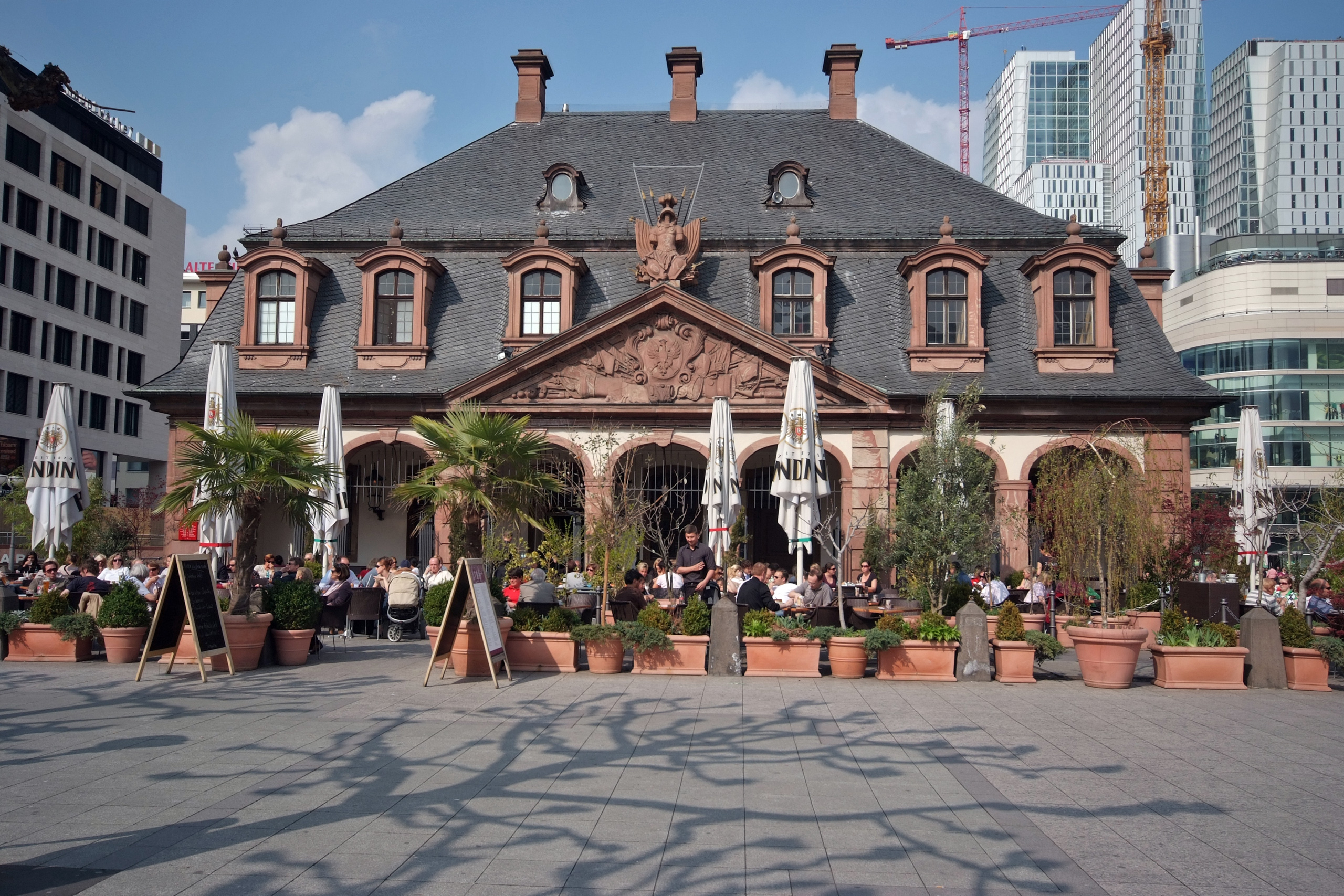 Hauptwachengebäude und Cafe